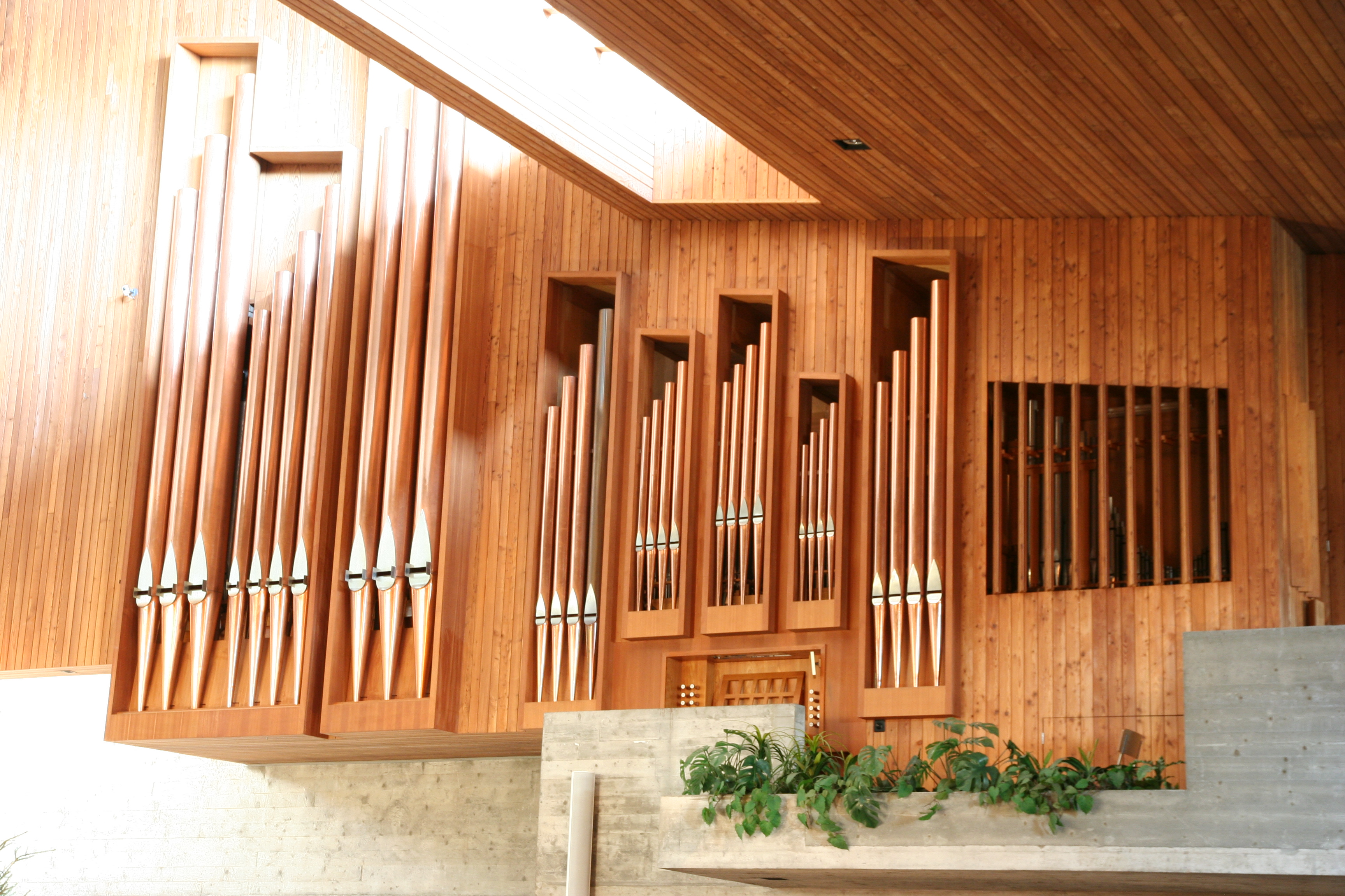 Römisch-katholische Pfarrkirche Herz Jesu in Buchs SG, erbaut von Justus Dahinden